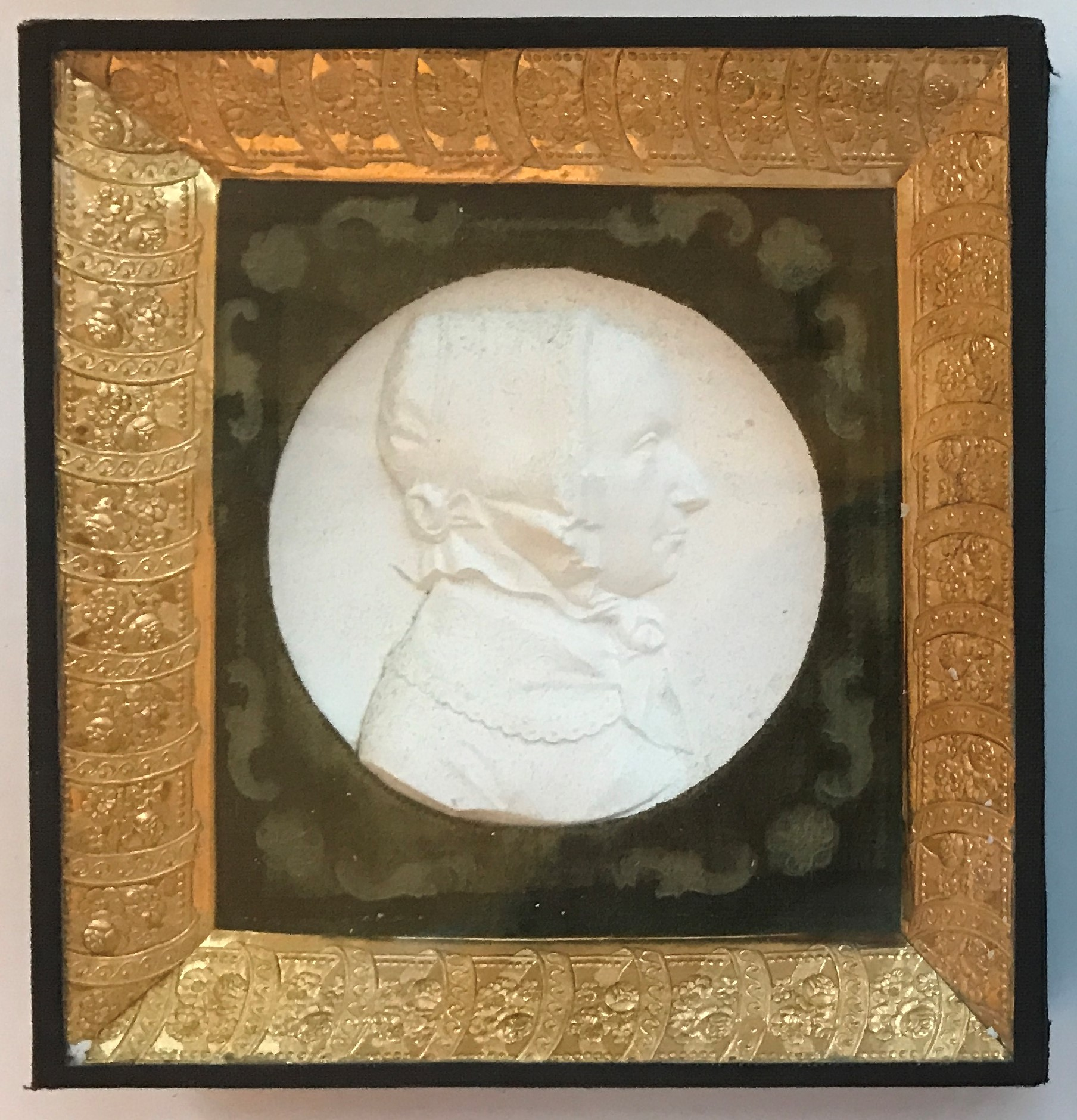 Reliefmedaillon von Johannette Wilhelmine geb. Schnabelius, Ehefrau von Christian Daniel Vogel